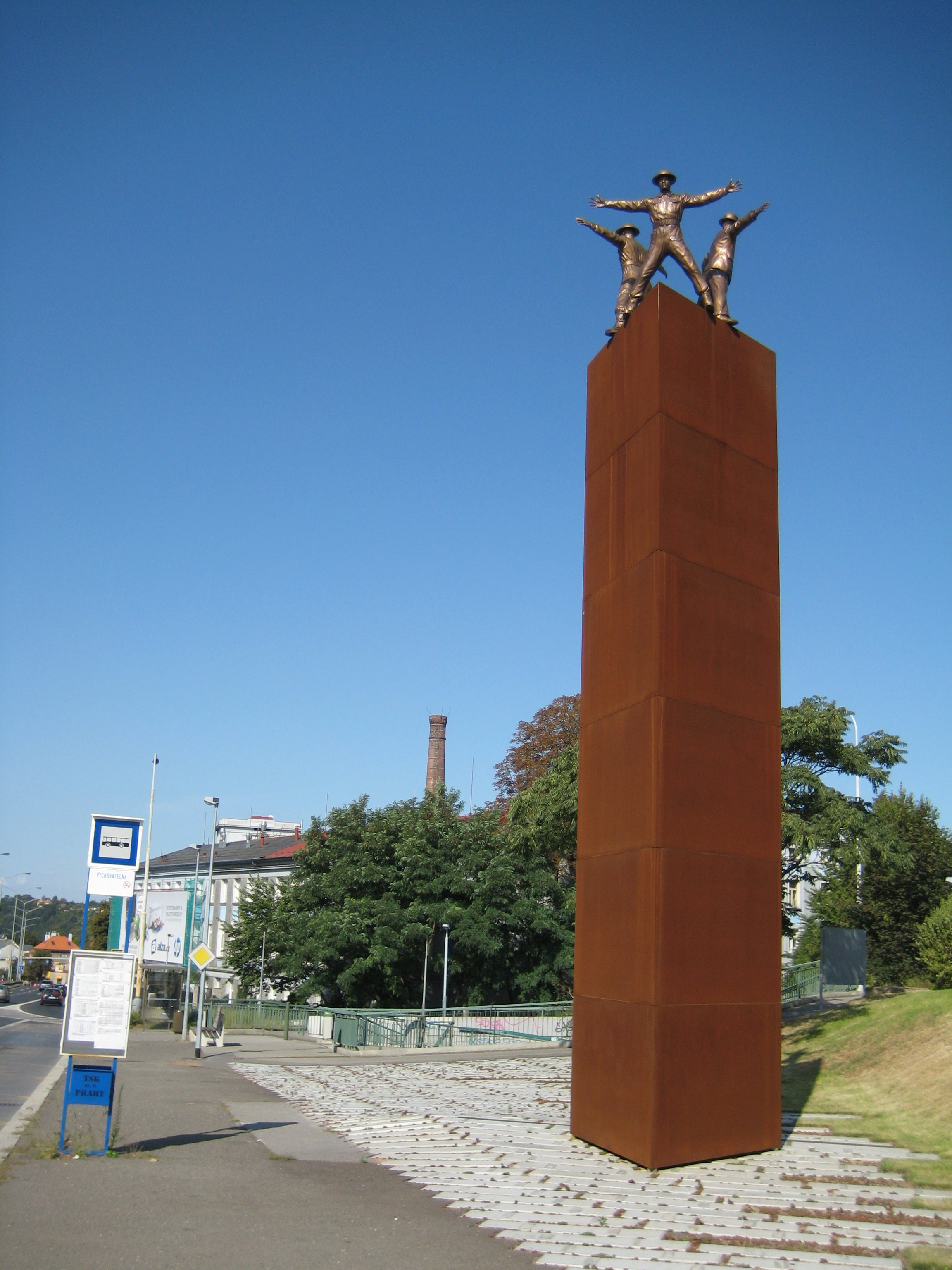 Monumento a la Operacion Antropoide, ubicado, aproximadamente (la zona se ha urbanizado considerablemente desde 1942), en el lugar en el que tuvo lugar el ataque a Reinhard Heydrich, en Praha. Fotografia tomada el dia 23 de Agosto de 2009, pocos meses despues de la inauguracion del mismo.